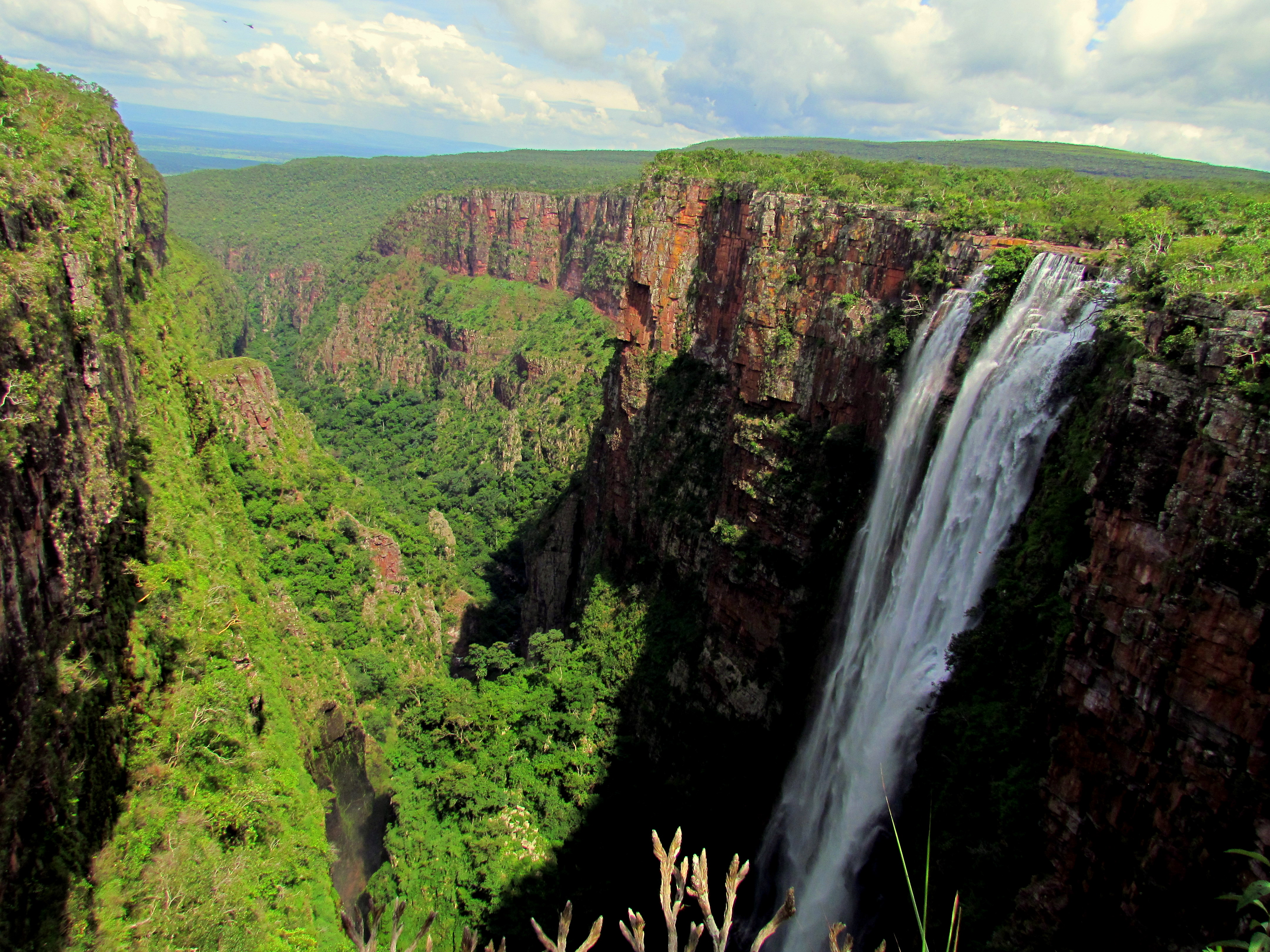 Parte alta da cachoeira do jatobá.